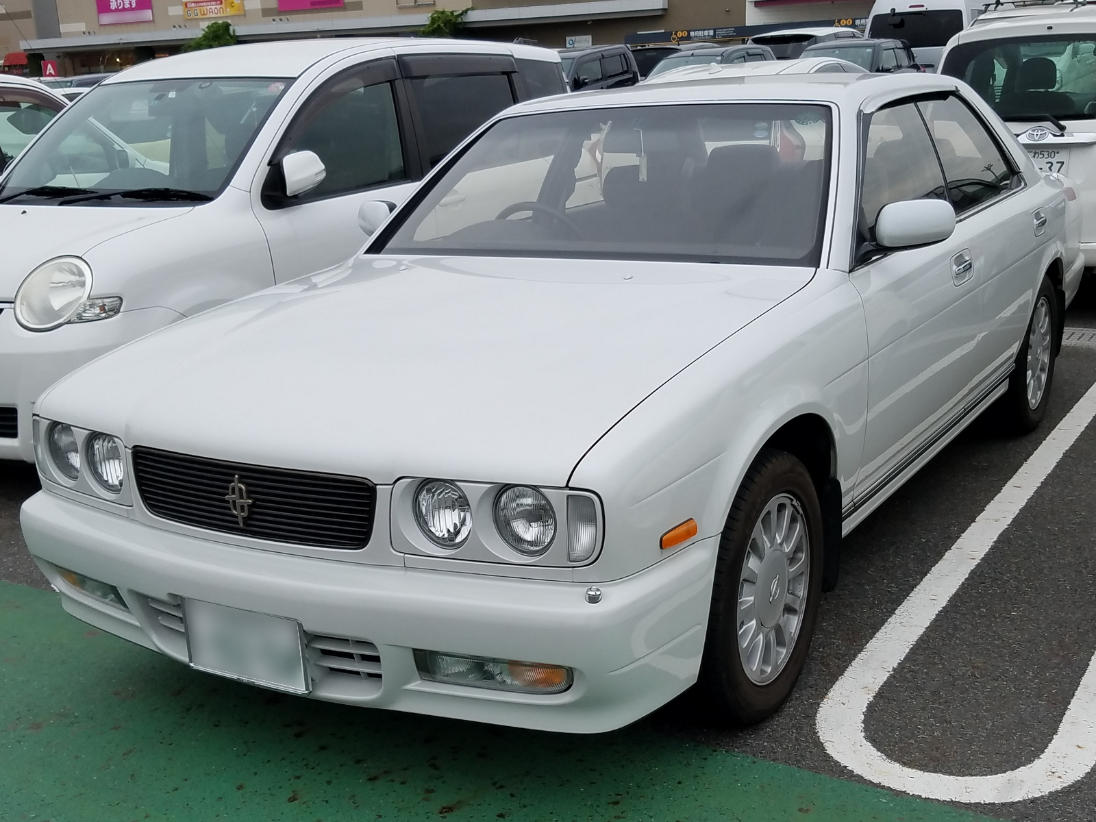 セドリック 4ドアハードトップ グランツーリスモ（後期型）